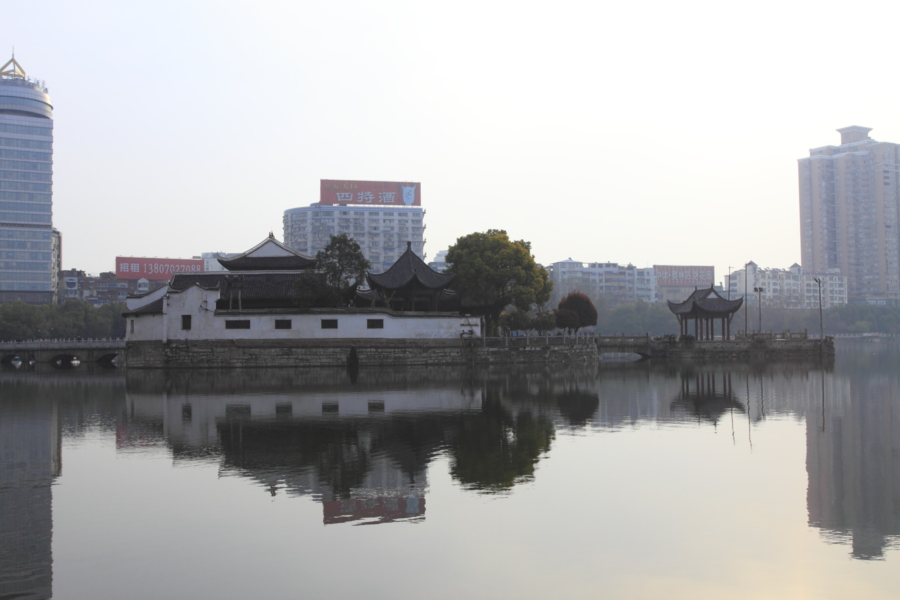 江西九江烟水亭，江西省文物保护单位